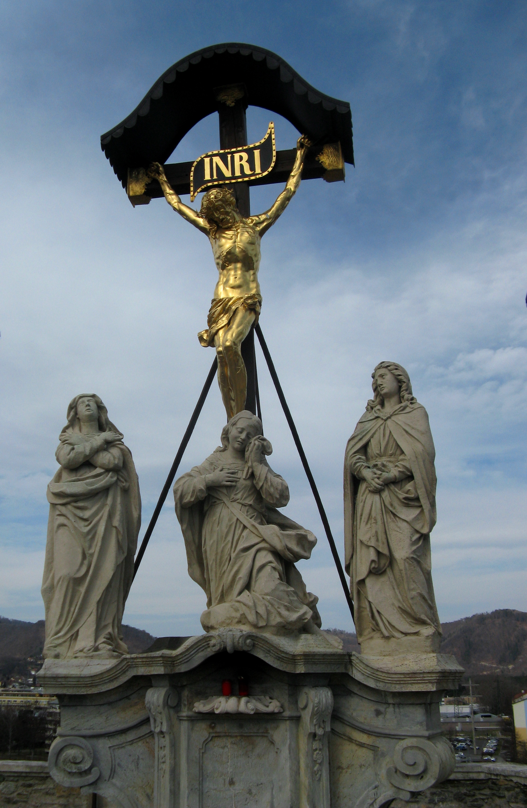 Grazer Kalvarienberg, Kreuzigungsgruppe, Mittelteil